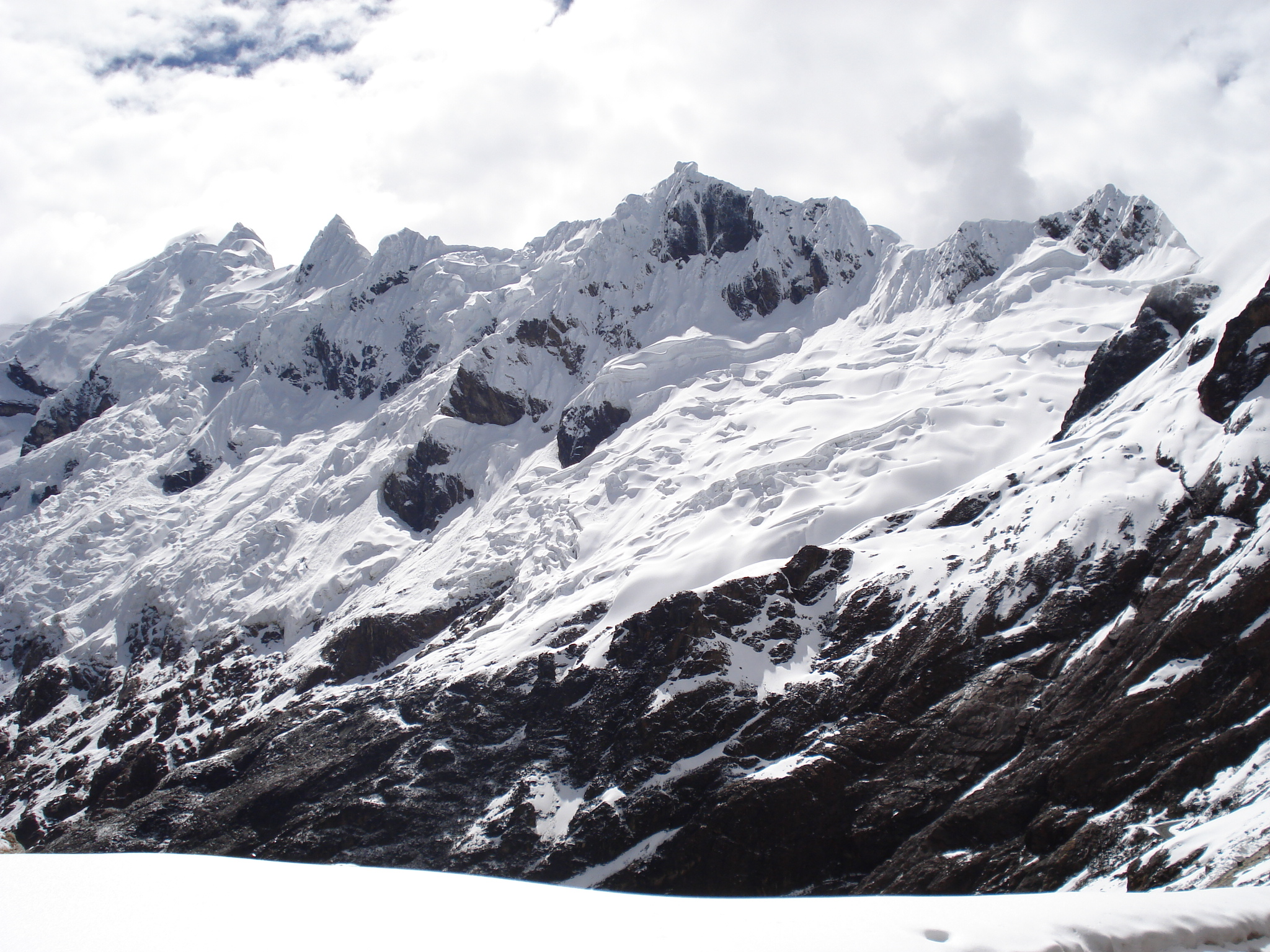 Pico Sur del Contrayerbas